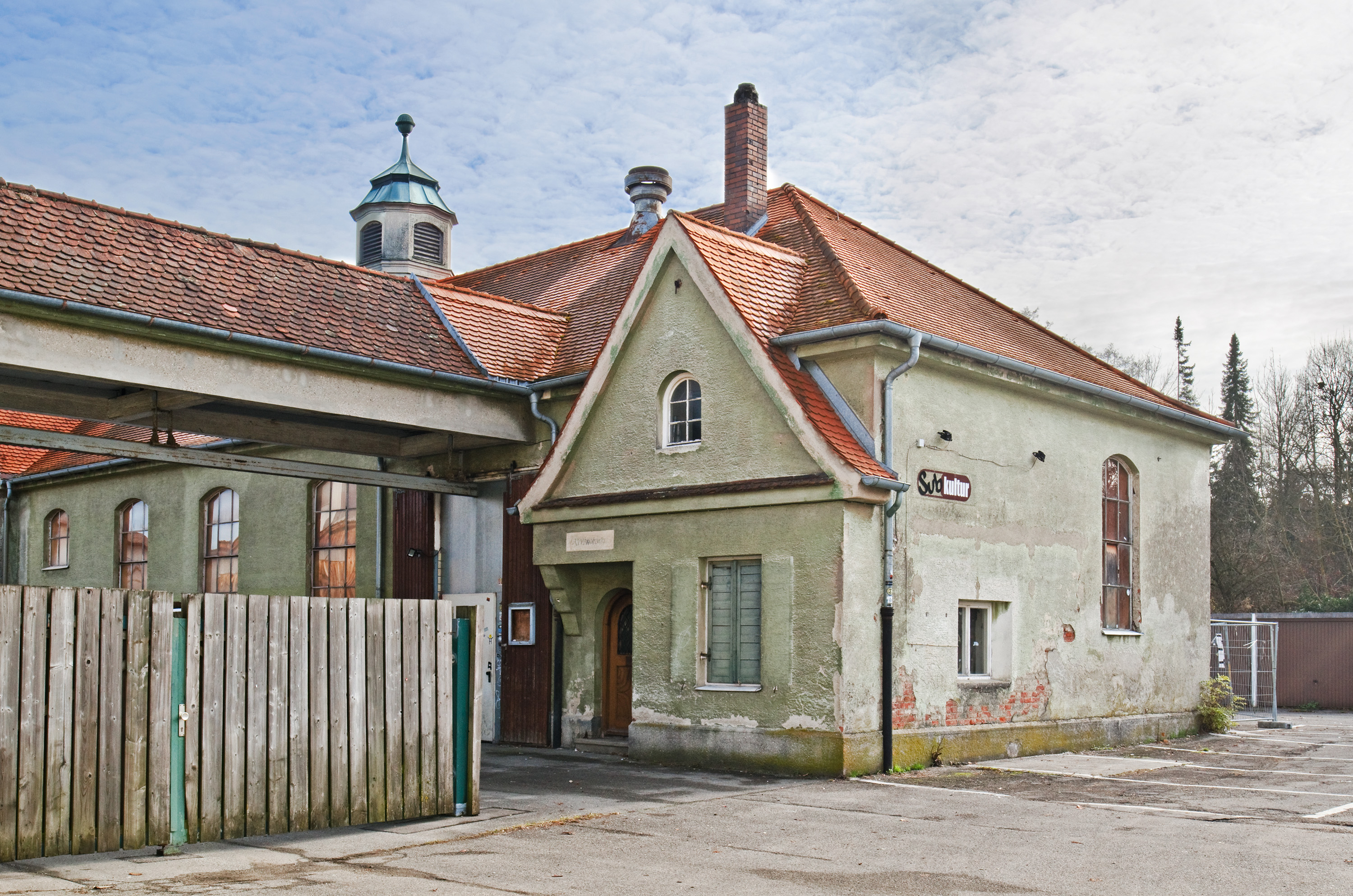 Alte Schlachthofanlage von 1911 mit Verbindung zum Warmbad auf der gegenüberliegenden Seite, das neben einem Kesselraum für Warmwasser auch das Kühllager beinhaltete. Das Gebäude wird von dem gemeinnützigen Verein Subkultur e. V. für Konzerte genutzt.This is a photograph of an architectural monument.